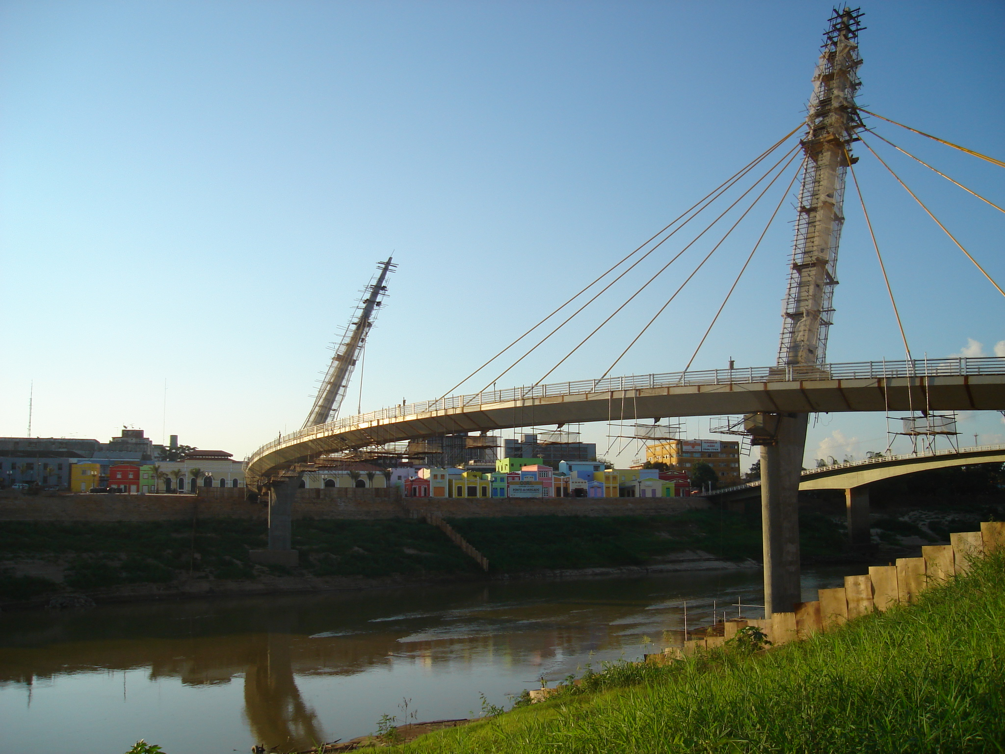 Construção da Ponte de Pedestres do Mercado de Rio Branco, Acre, Brasil. Fonte Autor: Filipe Mesquita de Oliveira